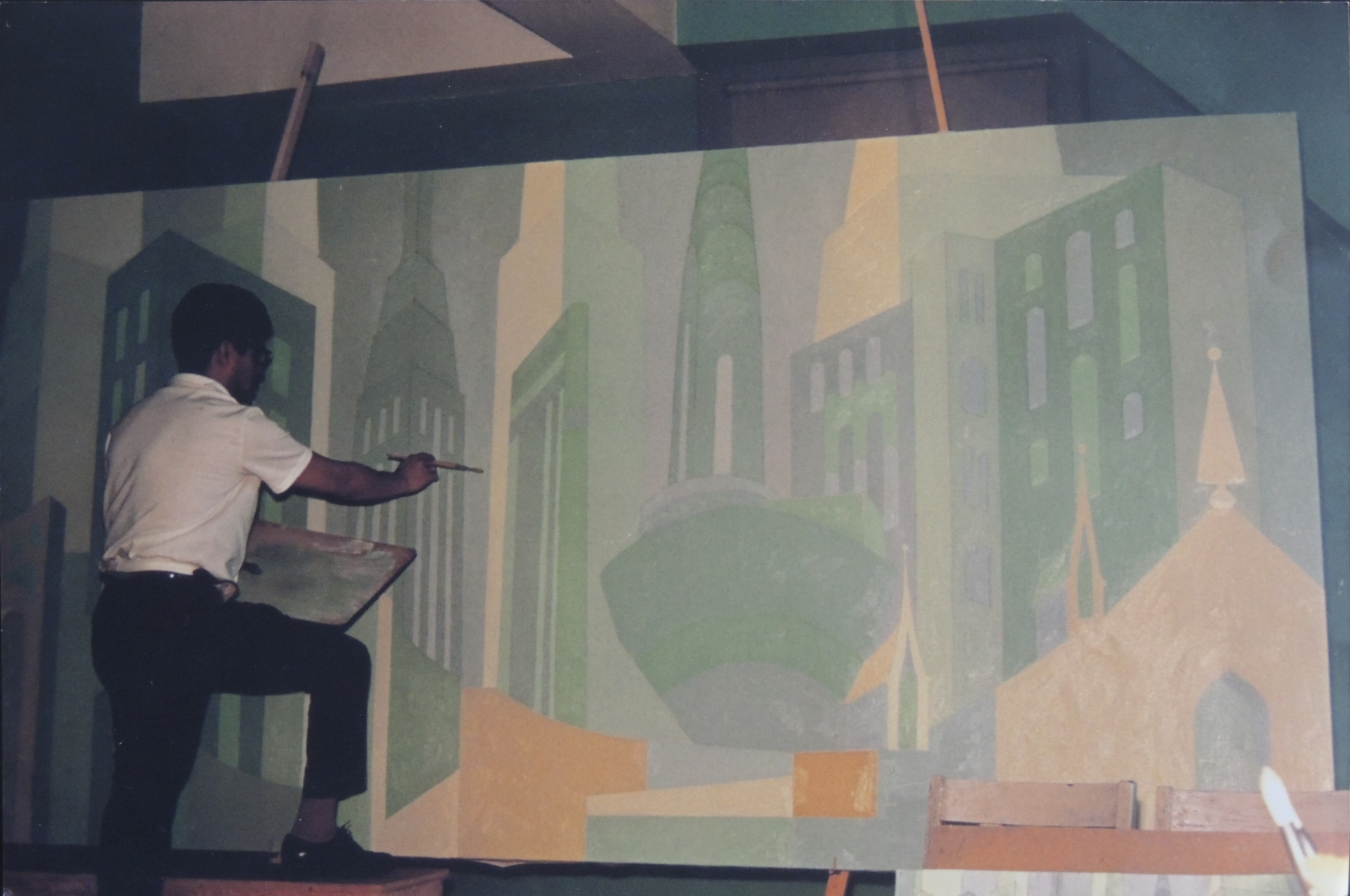 Nicolas Cuellar pintando el muraldel skiline de New York city en el Hospital Metodista de Brooklyn